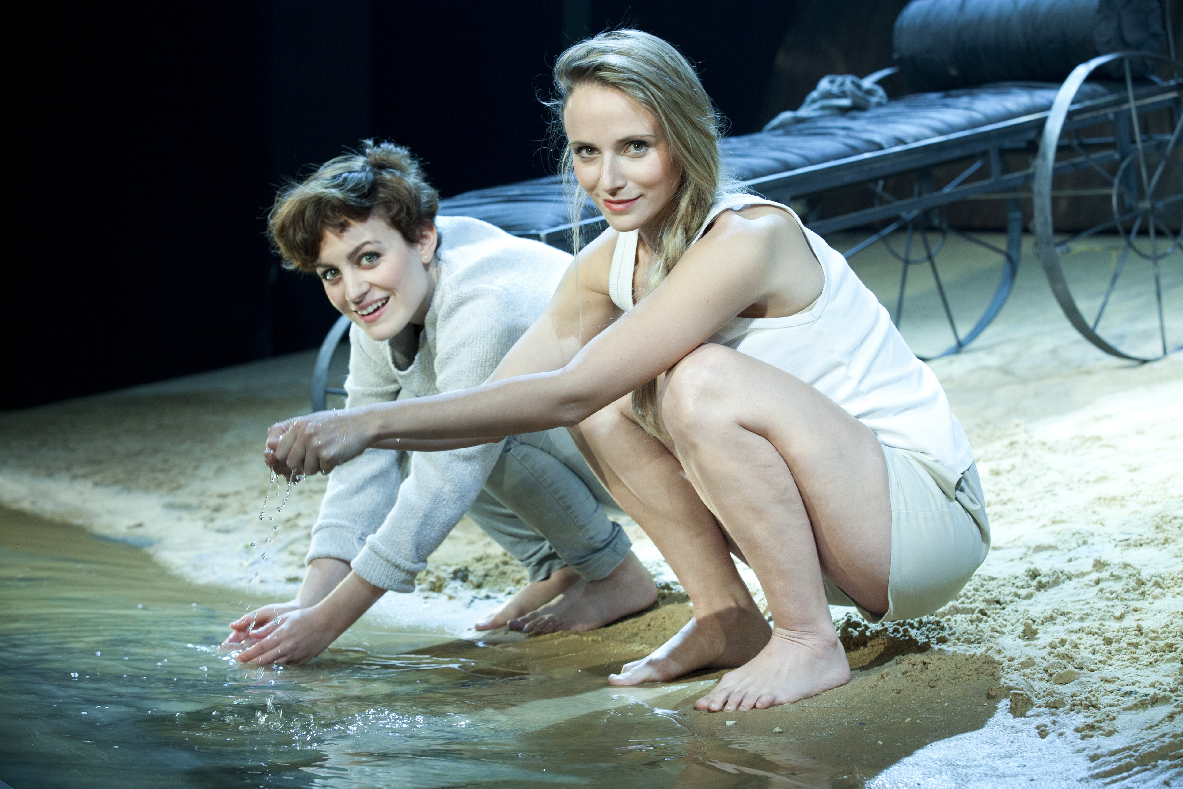 קארין סרויה ורות רסיוק בהצגה "אנטי" מאת ז'אן אנואי, בתיאטרון גשר